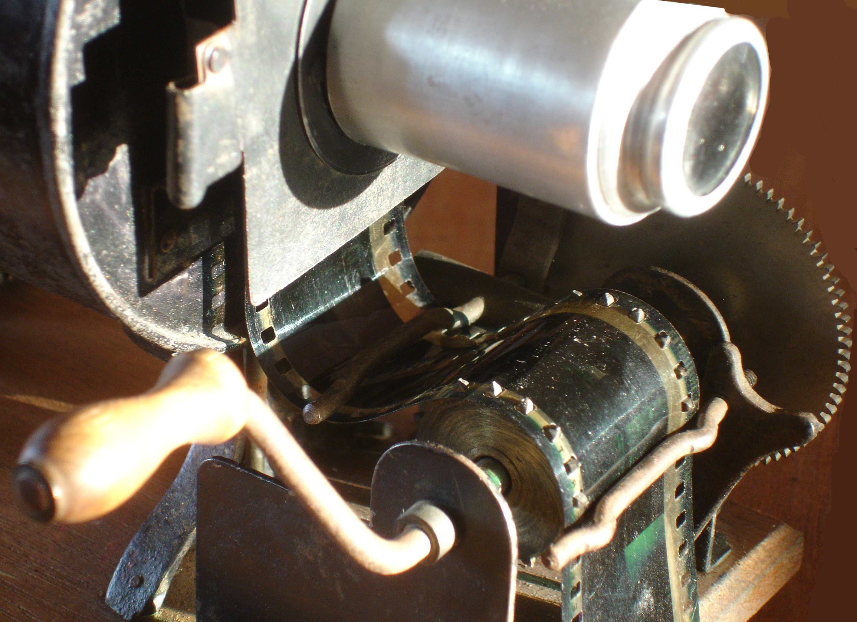 Description du fonctionnement d'une came battante, utilisée aux débuts du cinéma aussi bien pour des appareils de prise de vues que pour des appareils de projection. Ici, illustration n°2 sur un Jacko Ciné 35mm.